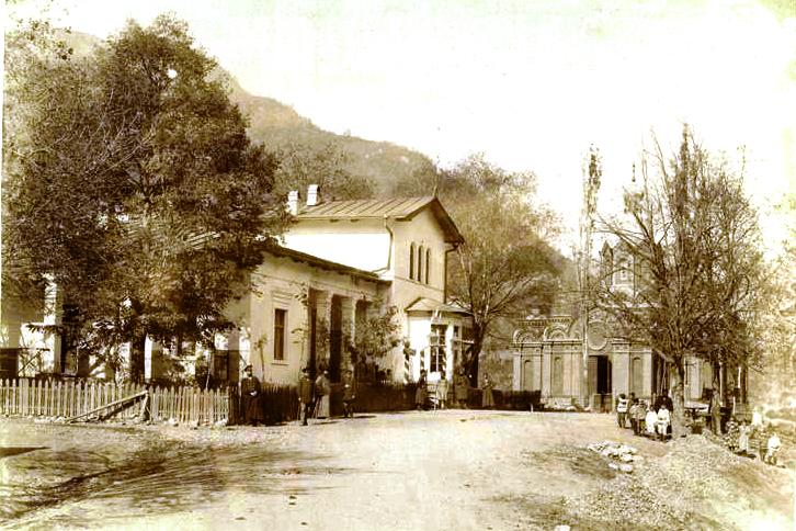 Georgian Military Road; Passanauri.